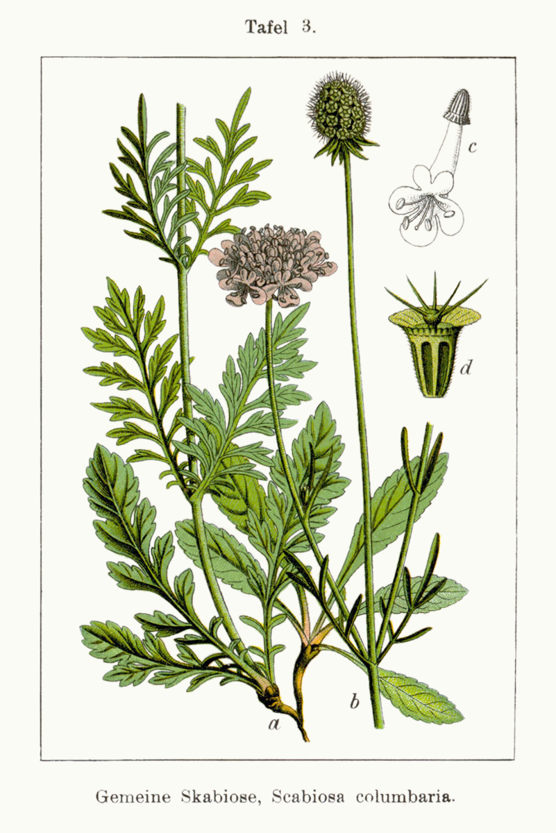 Scabiosa columbaria L. Original Description Gemeine Skabiose, Scabiosa columbaria